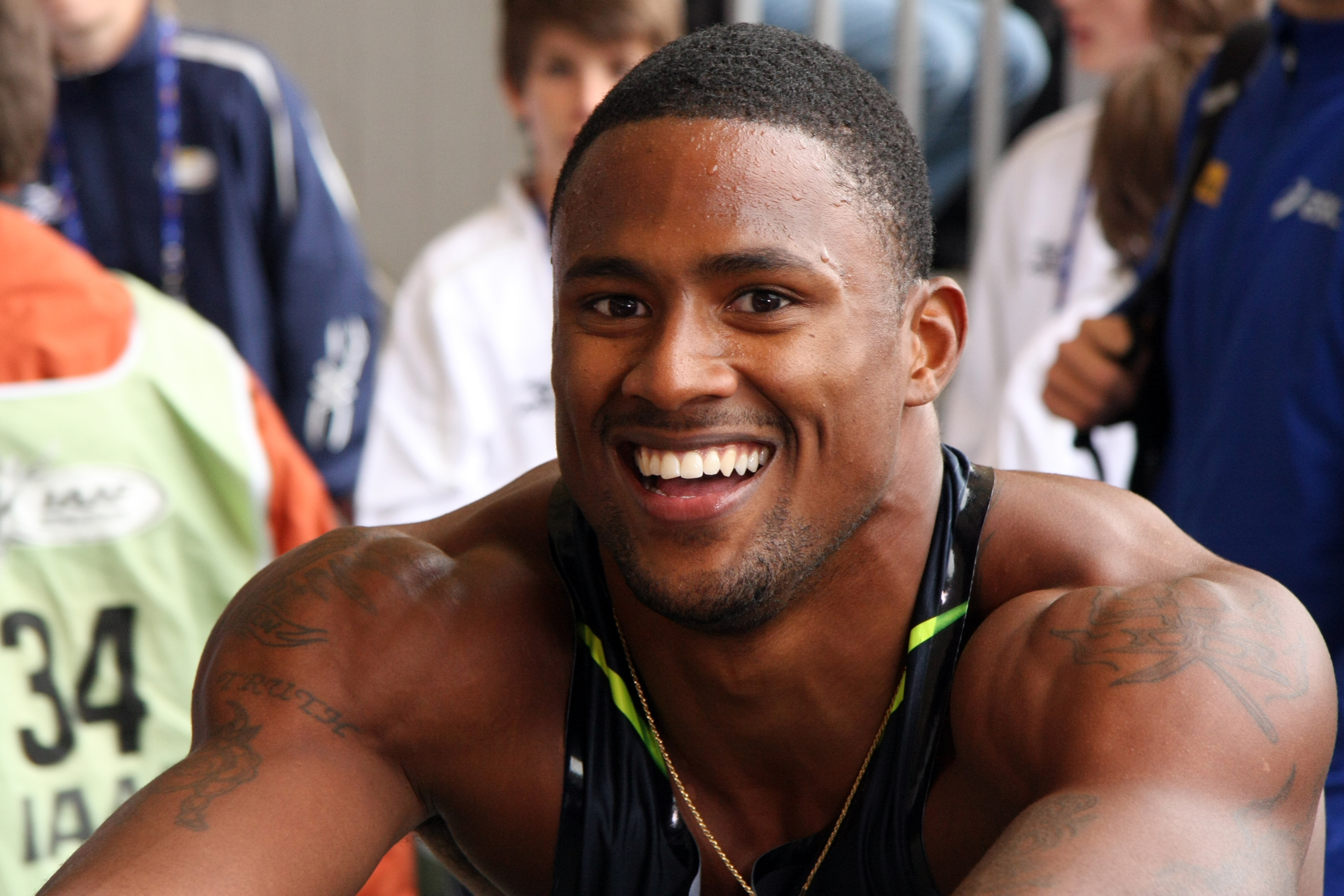 David Oliver 110 Metres Hurdles